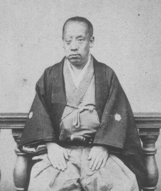 徳川慶頼または田安慶頼。Tokugawa Yoshiyori 鶏卵紙。